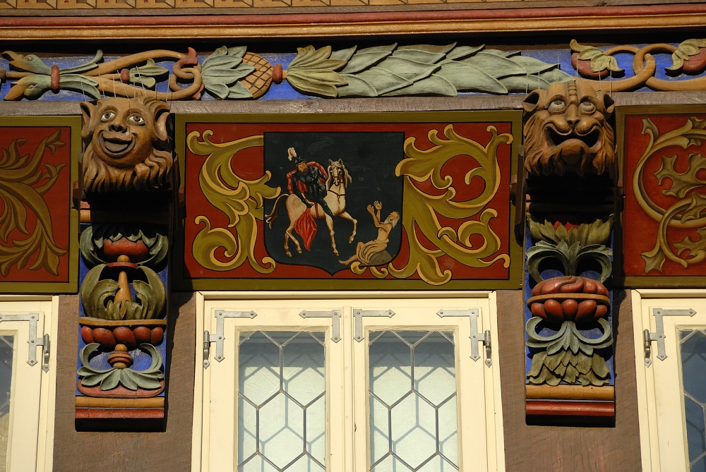 Dettaglio delle decorazioni della facciata principale che guarda sulla Piazza del Mercato